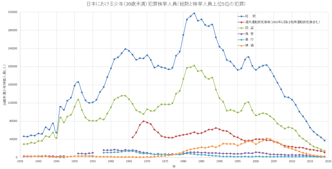 令和元年版犯罪白書の2-2-1-7図 少年による刑法犯 検挙人員の罪名別構成比の資料を基に1946年～2018年の検挙人員の総数と検挙人員上位5位の犯罪の推移